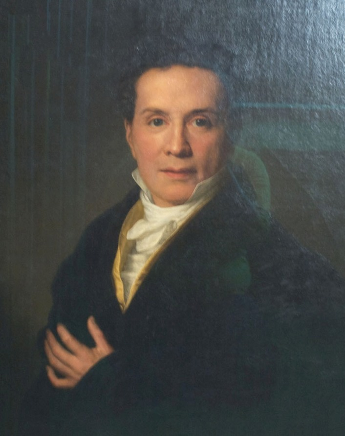 Jacob Herzfeld (1762–1826)